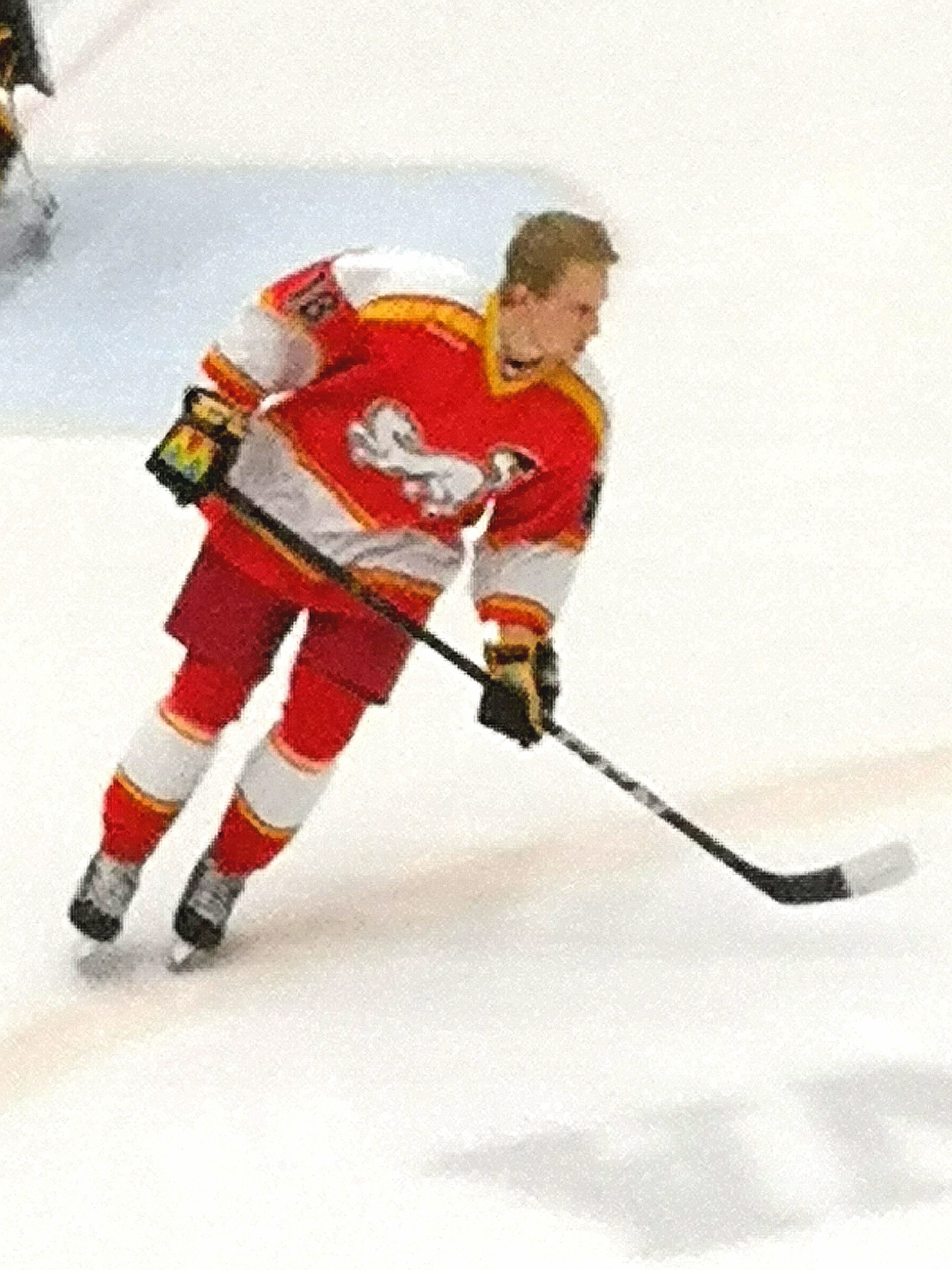 Sami Anttila retropaidassa 19.1.2018 Kärpät-Ässät ottelussa